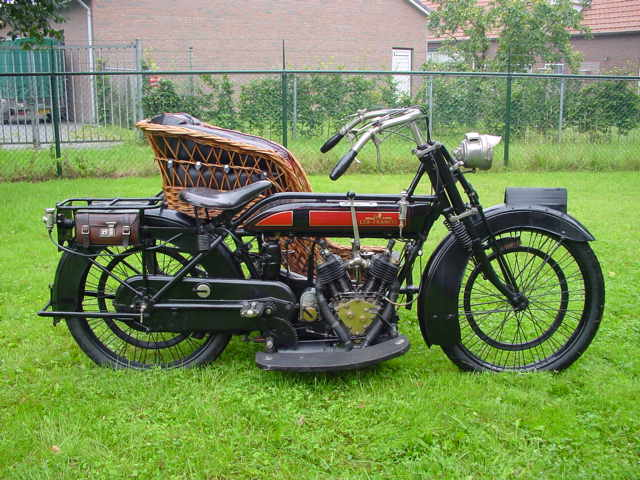 Toestemming van Yesterdays Antique Motorcycles (